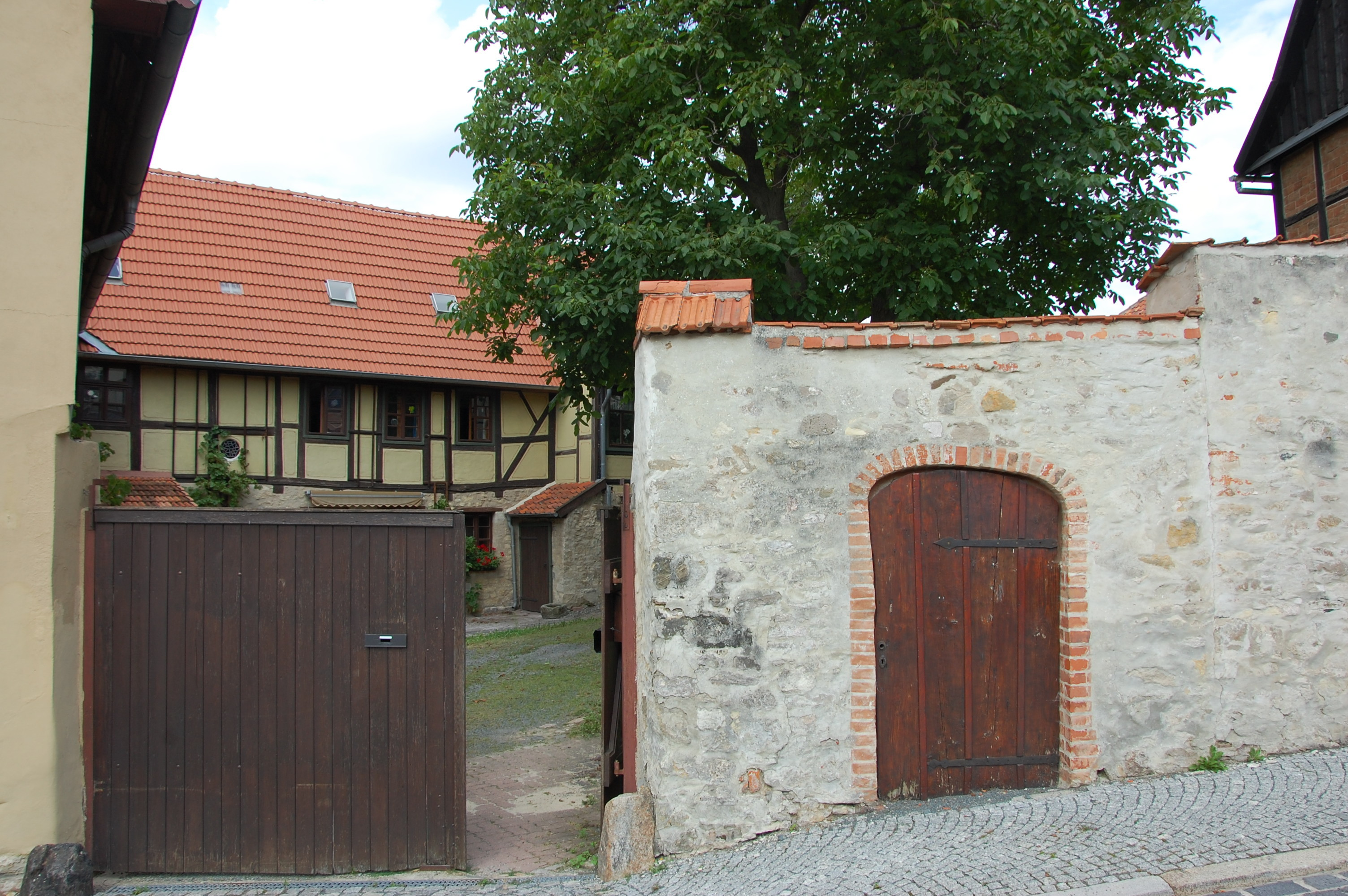 Haus Bergstraße 18 in Gernrode